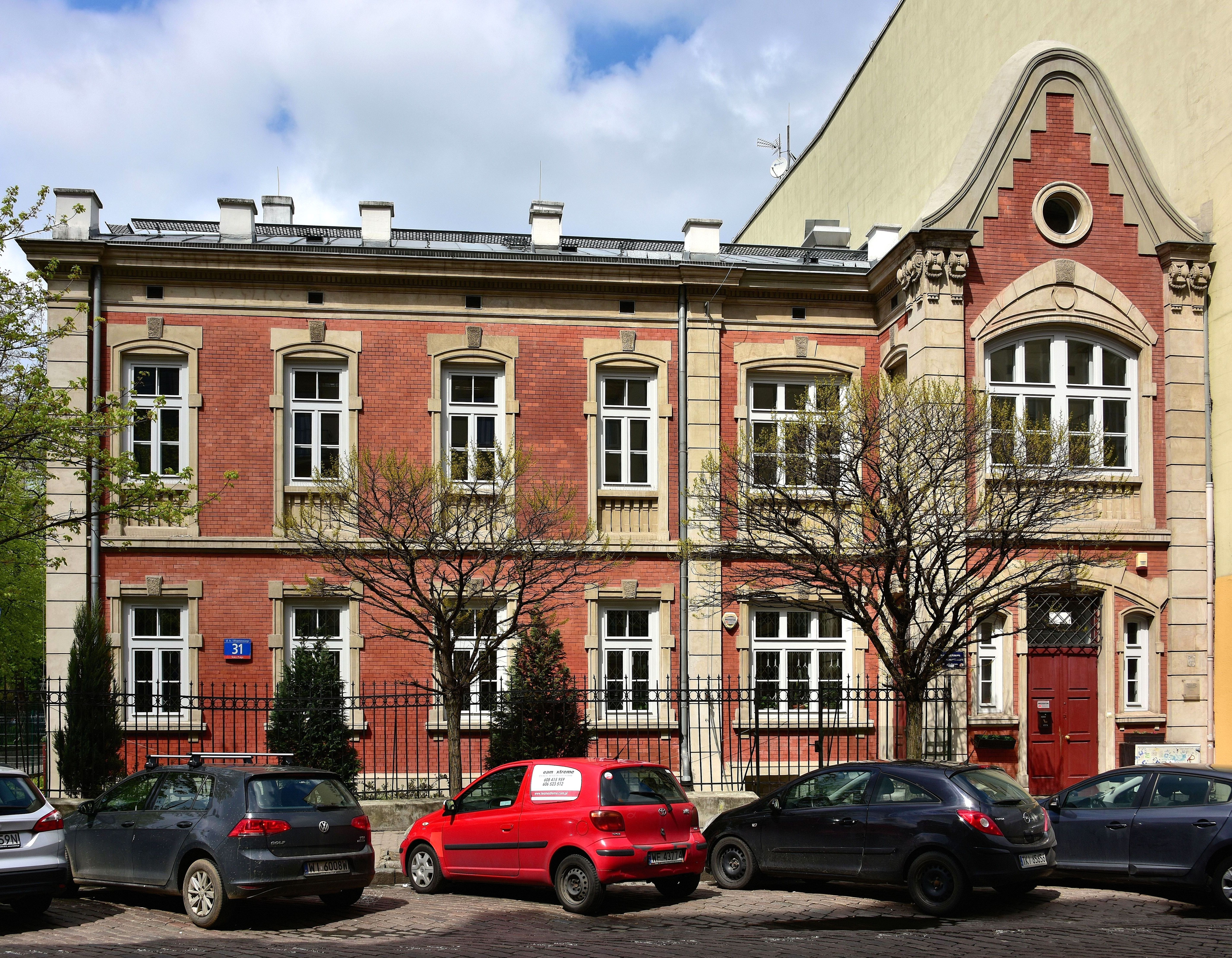 Dawna mykwa przy ul. Kłopotowskiego 31 w Warszawi